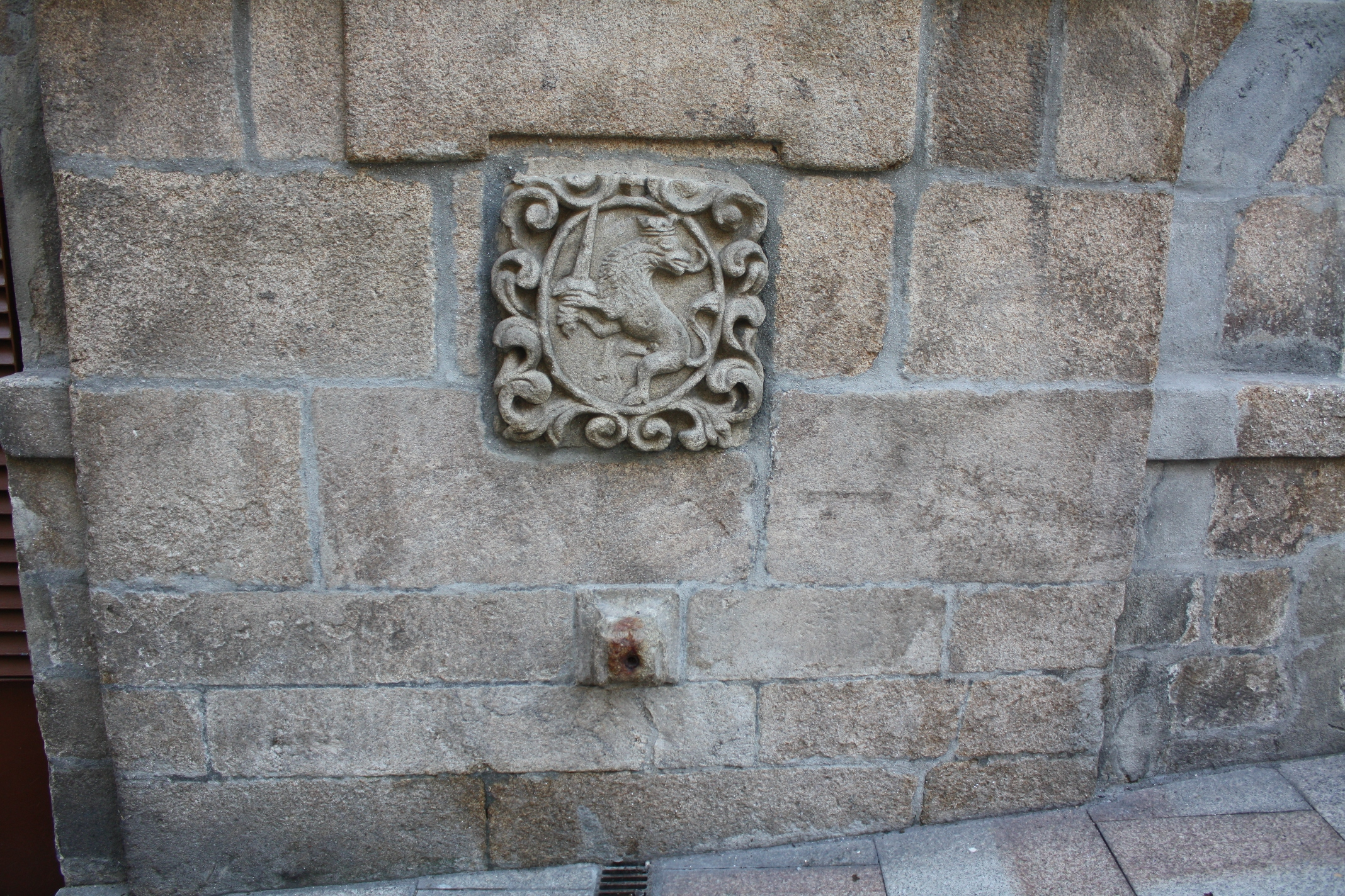 Fonte do Rei, unha das estacións da ruta da Esmorga, de Blanco Amor.